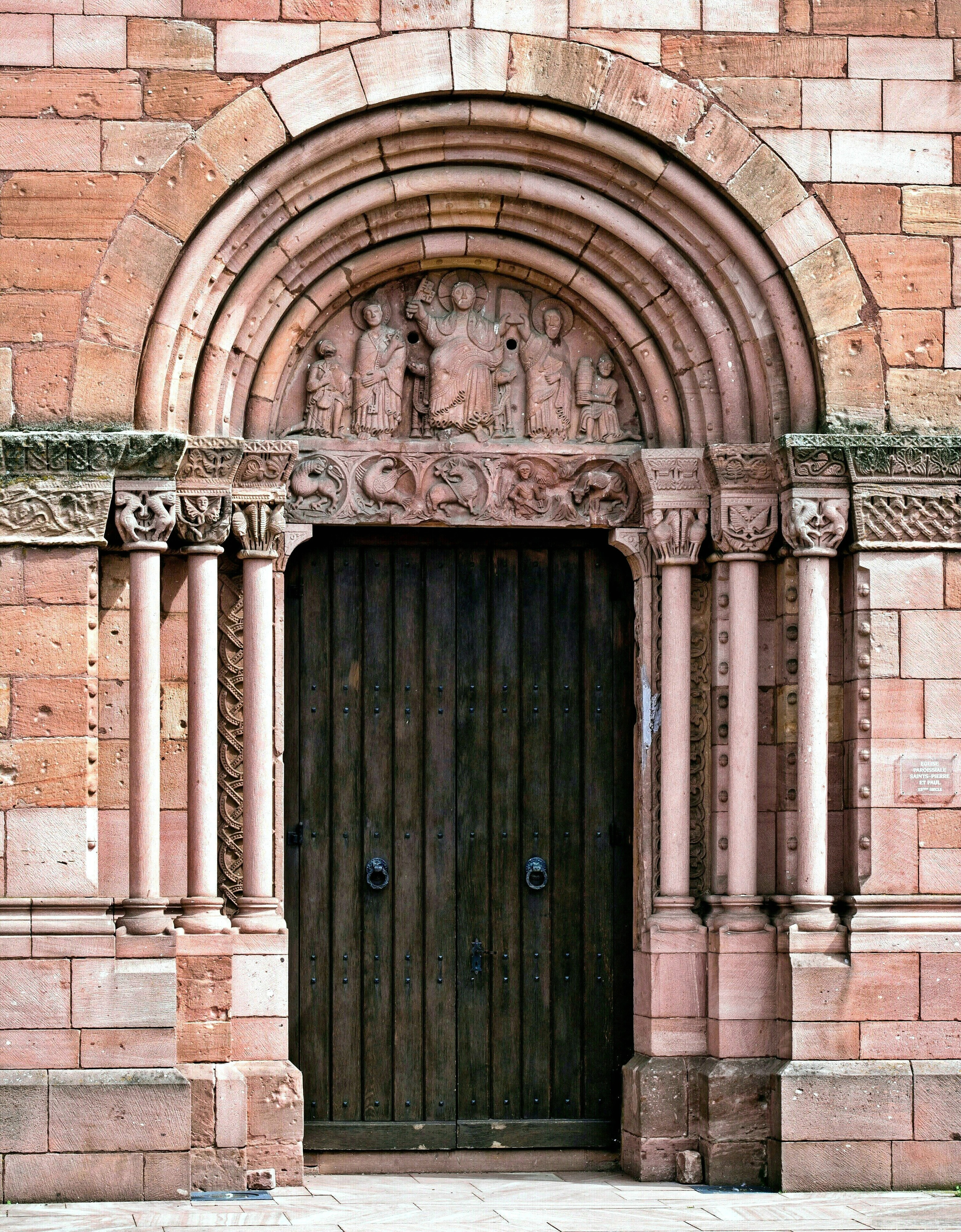 Im Tympanon übergibt Christus den beiden Kirchenpatronen Peter und Paul die Himmelsschlüssel bzw. das Buch mit den Briefen, die Paulus an die ersten christlichen Gemeinden geschrieben hatte. Daneben knien ein Edelmann und ein Winzer, die ihre Gaben anbieten. Im Türsturz das Osterlamm mit den Evangelistensymbolen.